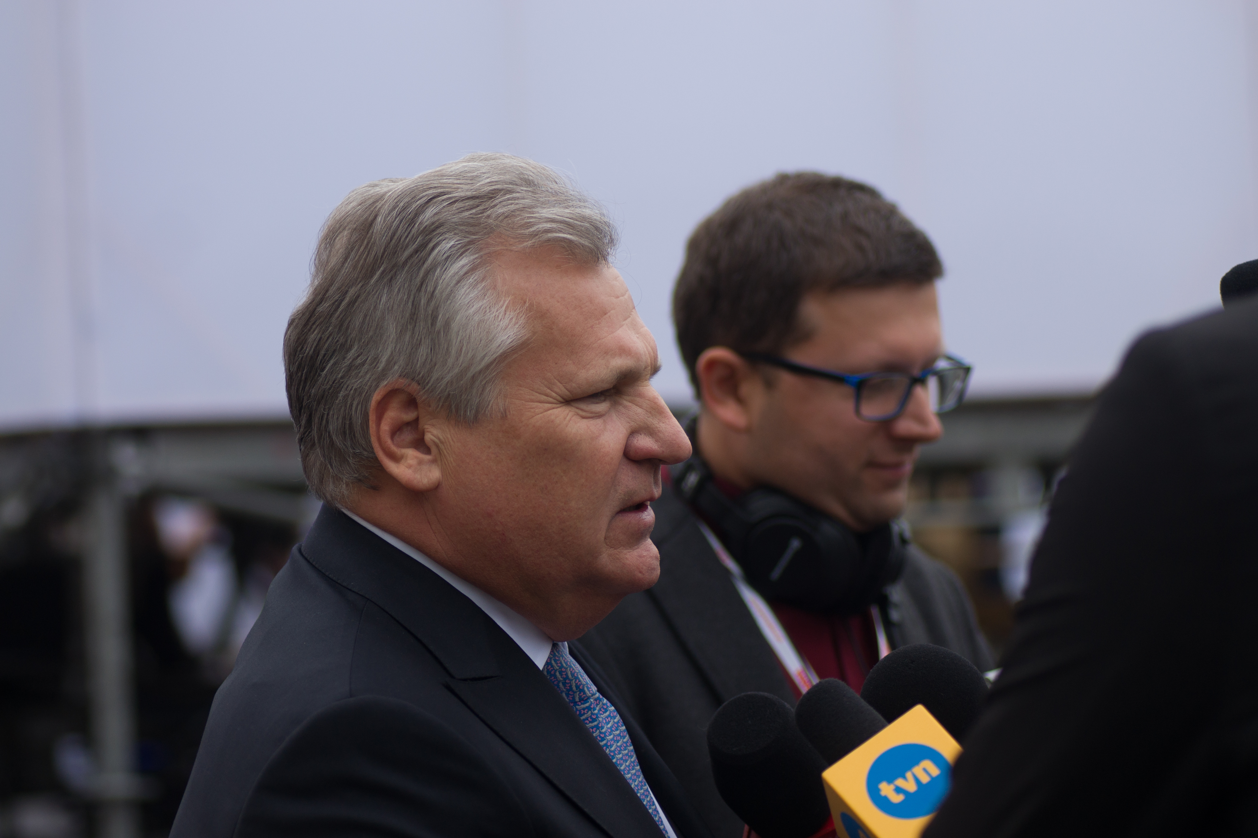 Poland 25th Anniversary of Freedom - with President Barack Obama, President Bronisław Komorowski and Prime Minister Donald Tusk - 4 June 2014 - Warsaw, Poland